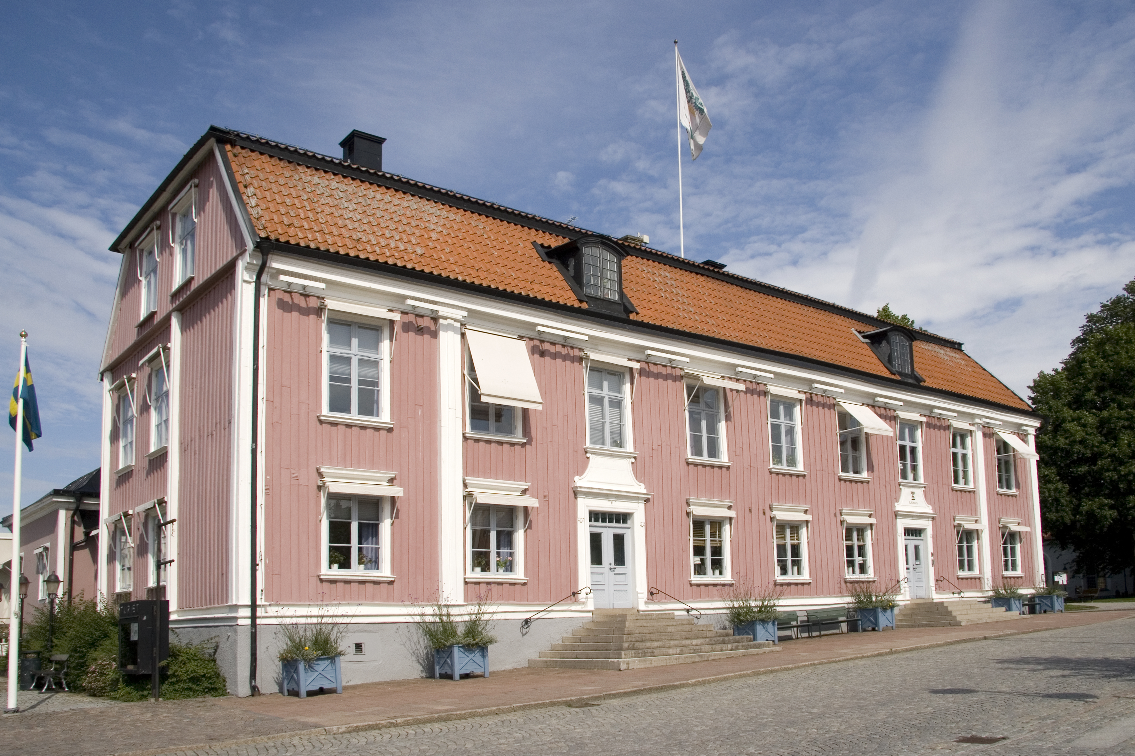 Alingsås rådhus.